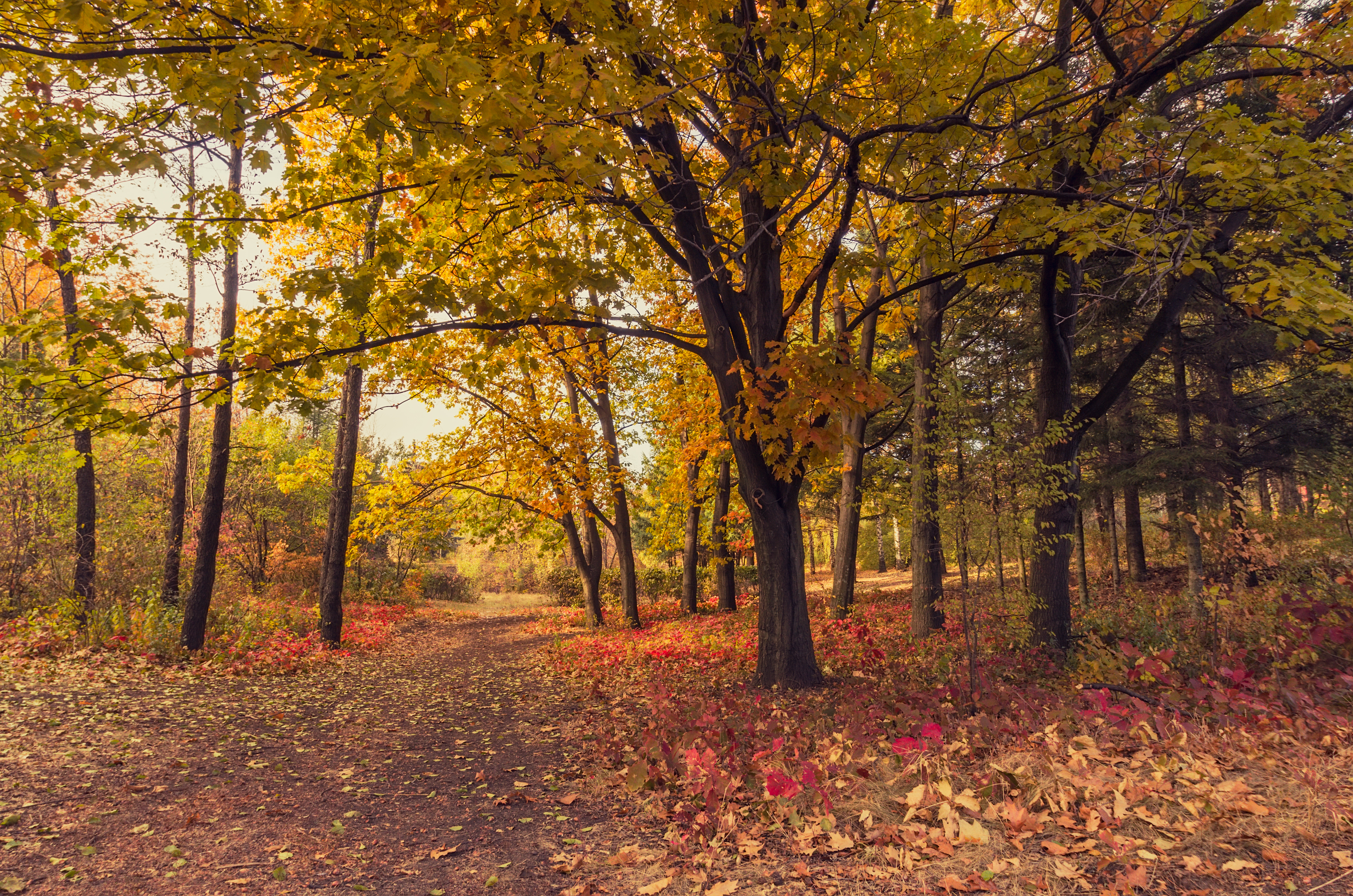 Дендрологічний парк Харківського національного аграрного університету ім. В. В. Докучаєва, Харківський район с. Рогань